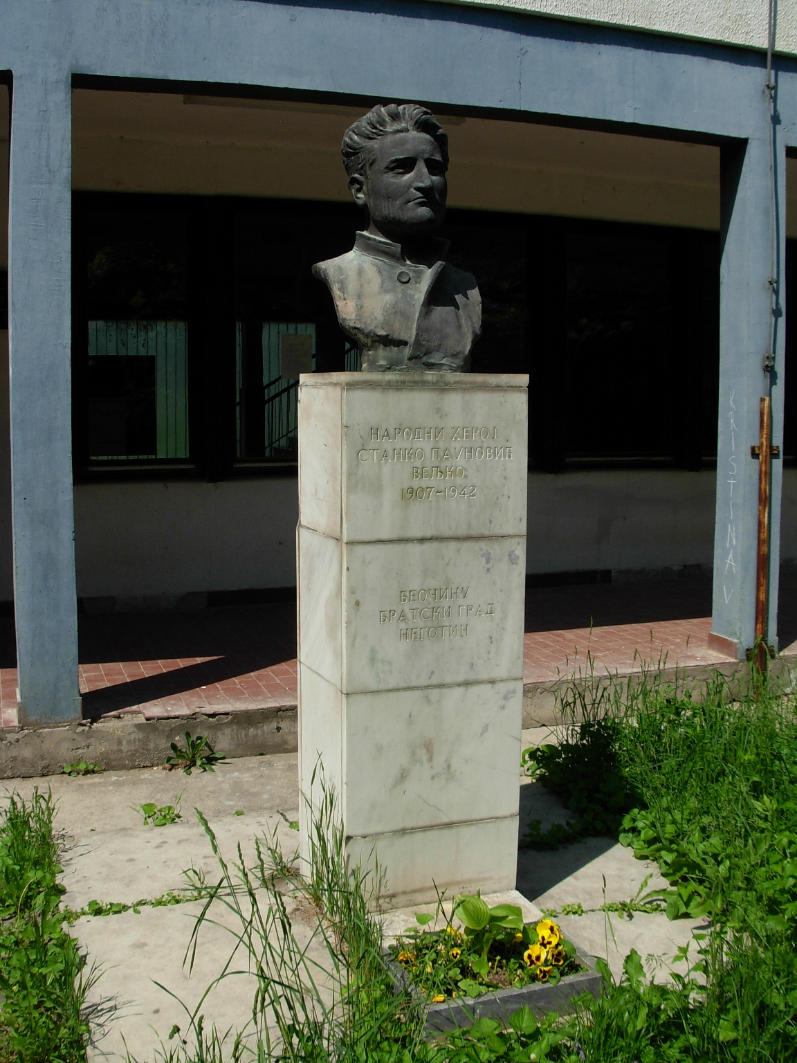 Bista Stanka Paunovića Veljka ispred osnovne škole u Beočinu.